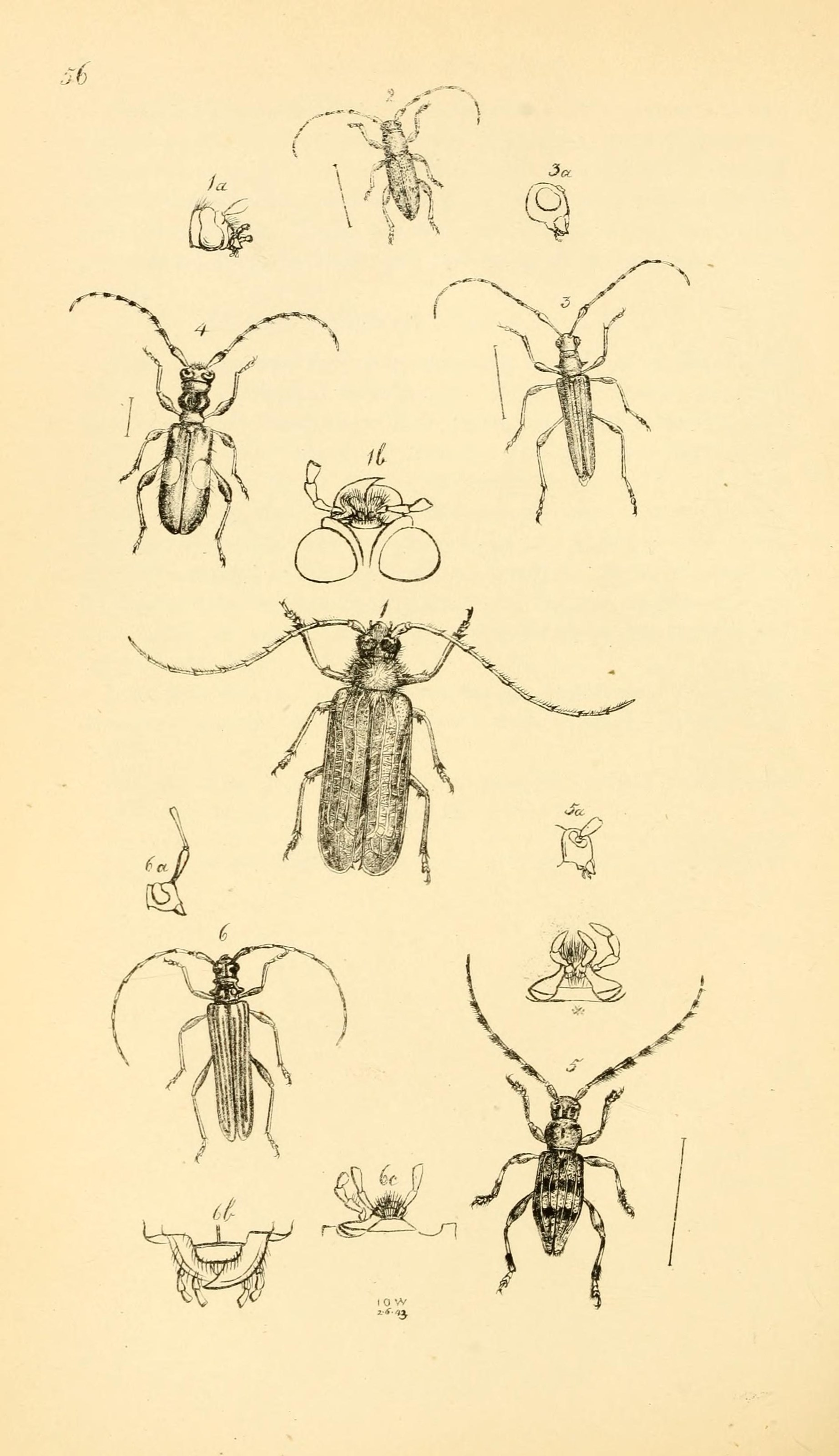 Plate 56